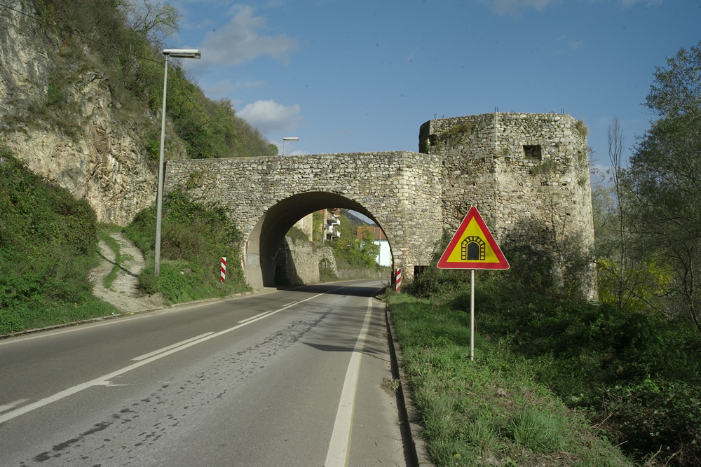 Zvornička kapija se nalazi u sklopu tvrđave Đurđev-grad i od tri stara grada, koliko je činilo tadašnji Zvornik, kapija pripada Donjem gradu. To je bio ulaz u zvornički grad sa južne strane tokom svih godina postojanja. Danas se takođe koristi kao dio regionalnog puta Bijeljina - Sarajevo. Autor: Radiša Kandić